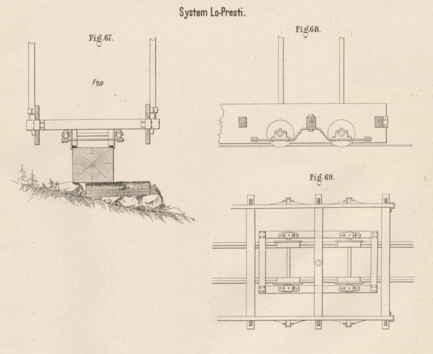 Eisenbahnsystem Lo-Presti - Wagen (cropped and retouched)